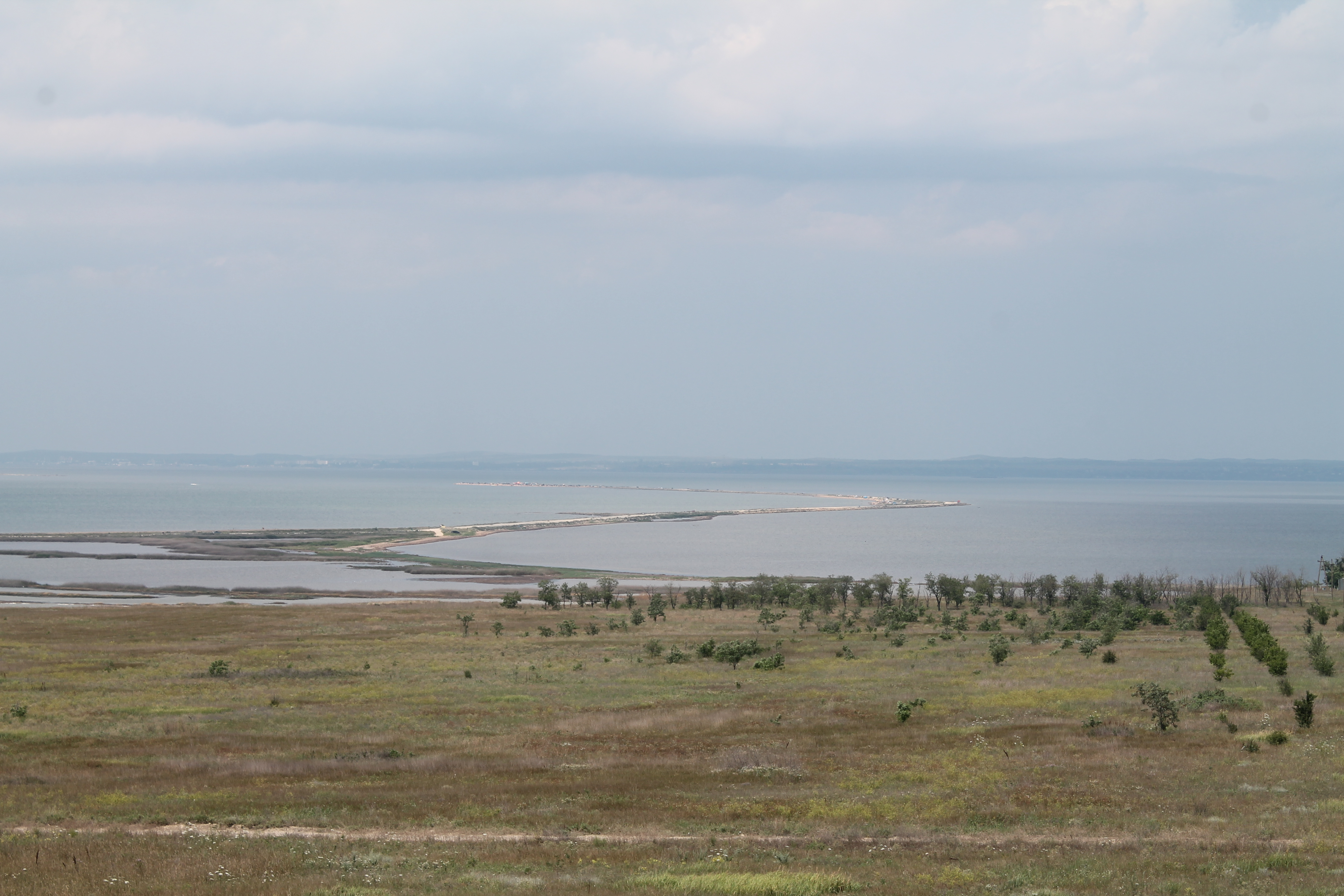 Тузлинская коса